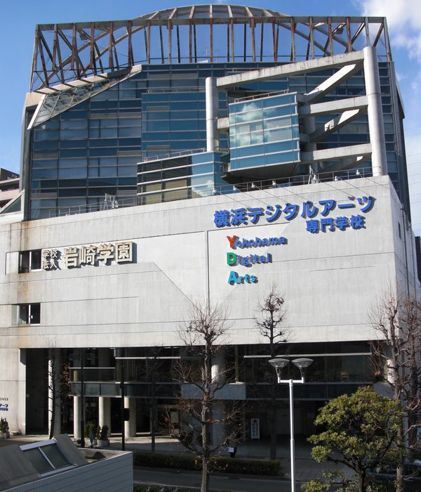 Yokohama Degital Arts in Kōhoku-ku, Yokohama (神奈川県横浜市港北区 横浜デジタルアーツ専門学校 2号館)